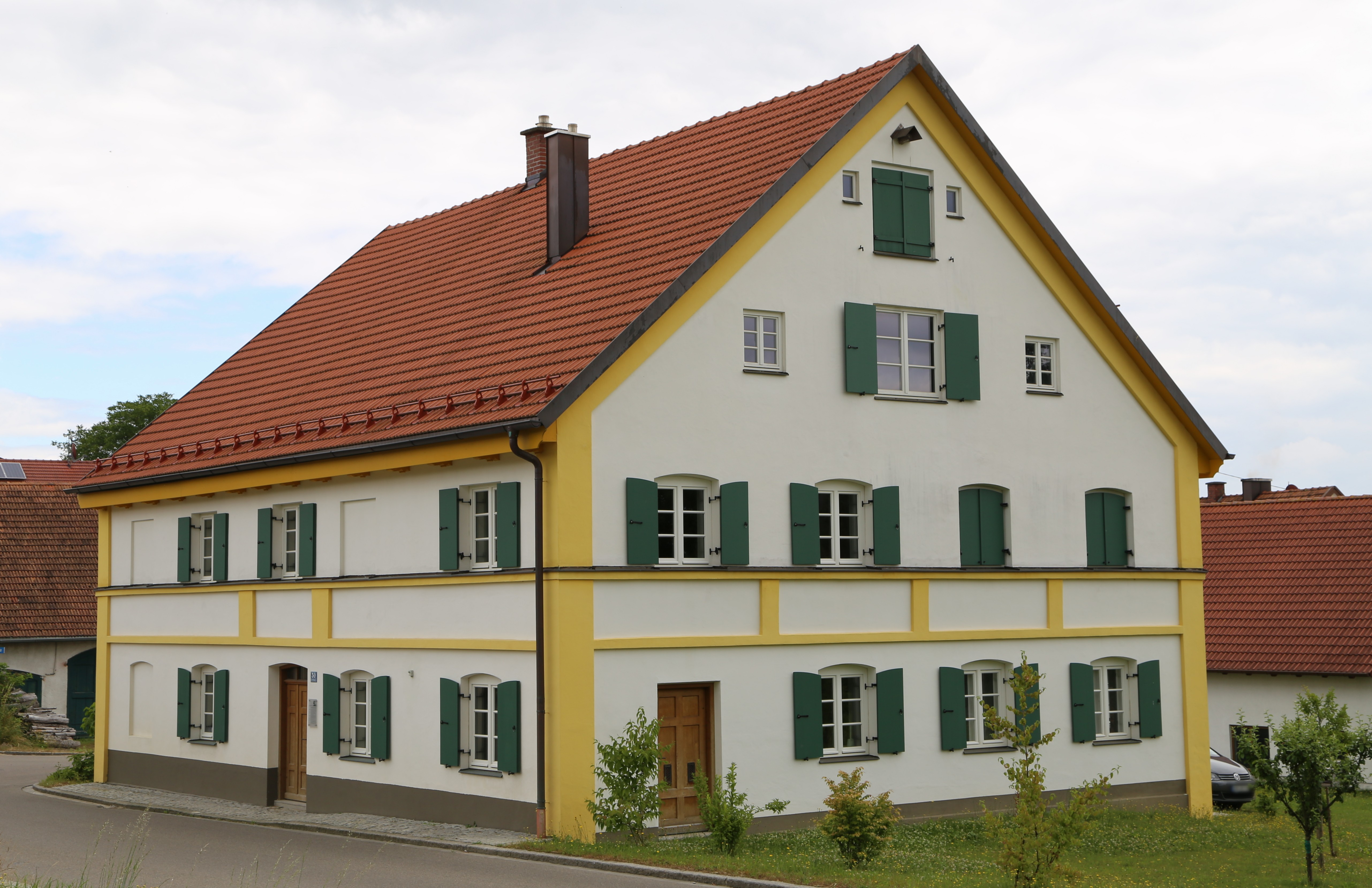 Bischof-Neuhäusler-Straße 50, Eisenhofen, Erdweg; Bauernhaus, zweigeschossiger Satteldachbau mit Lisenen- und Gesimsgliederung, im Kern 18. Jahrhundert, 1873 ausgebaut; Geburtshaus des Münchner Weihbischofs Johannes Neuhäusler